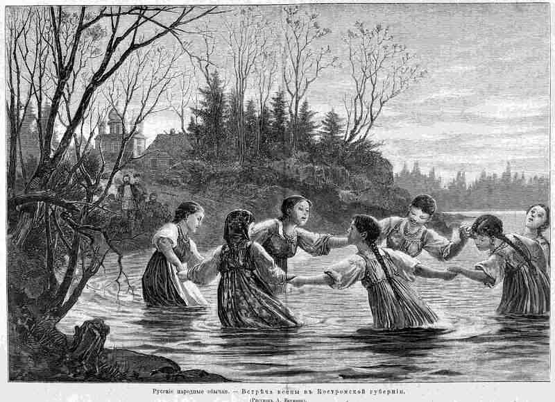 Встреча весны. Костромская губерния. "Всемирная иллюстрация", №16, 1882.